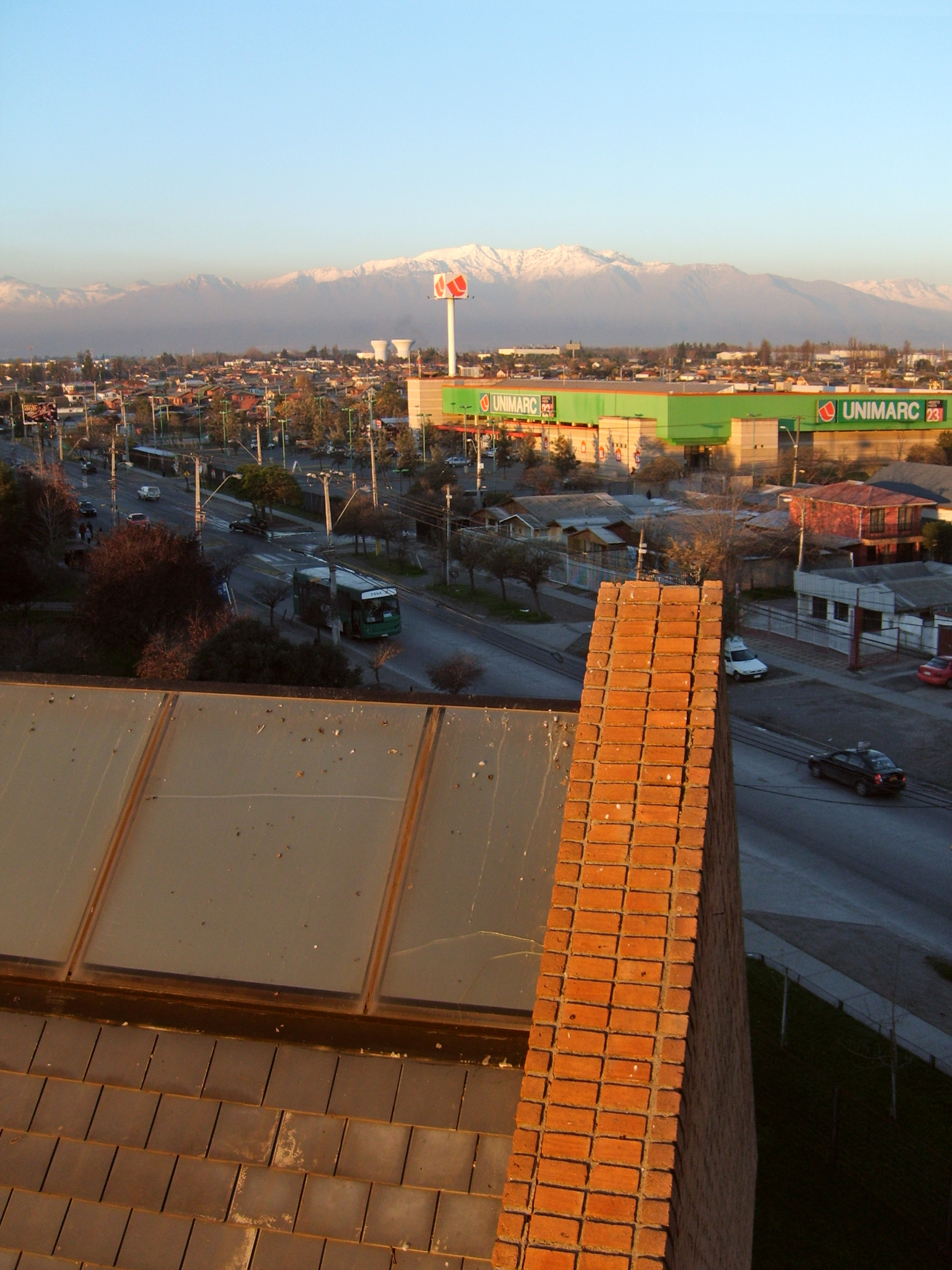 La avenida Alfredo Silva Carvallo en la villa Los Héroes (Maipú, Santiago de Chile), vista desde el campanario de la capilla Sagrada Familia. Al fondo de divisa el supermercado Unimarc, los estanques de agua elevados de SMAPA (copas blancas) y la cordillera de Los Andes.